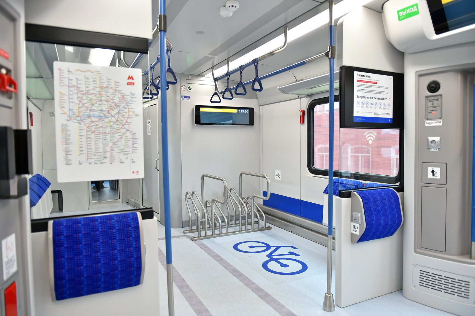 Передняя часть салона головного вагона электропоезда ЭГ2Тв-029 Иволга